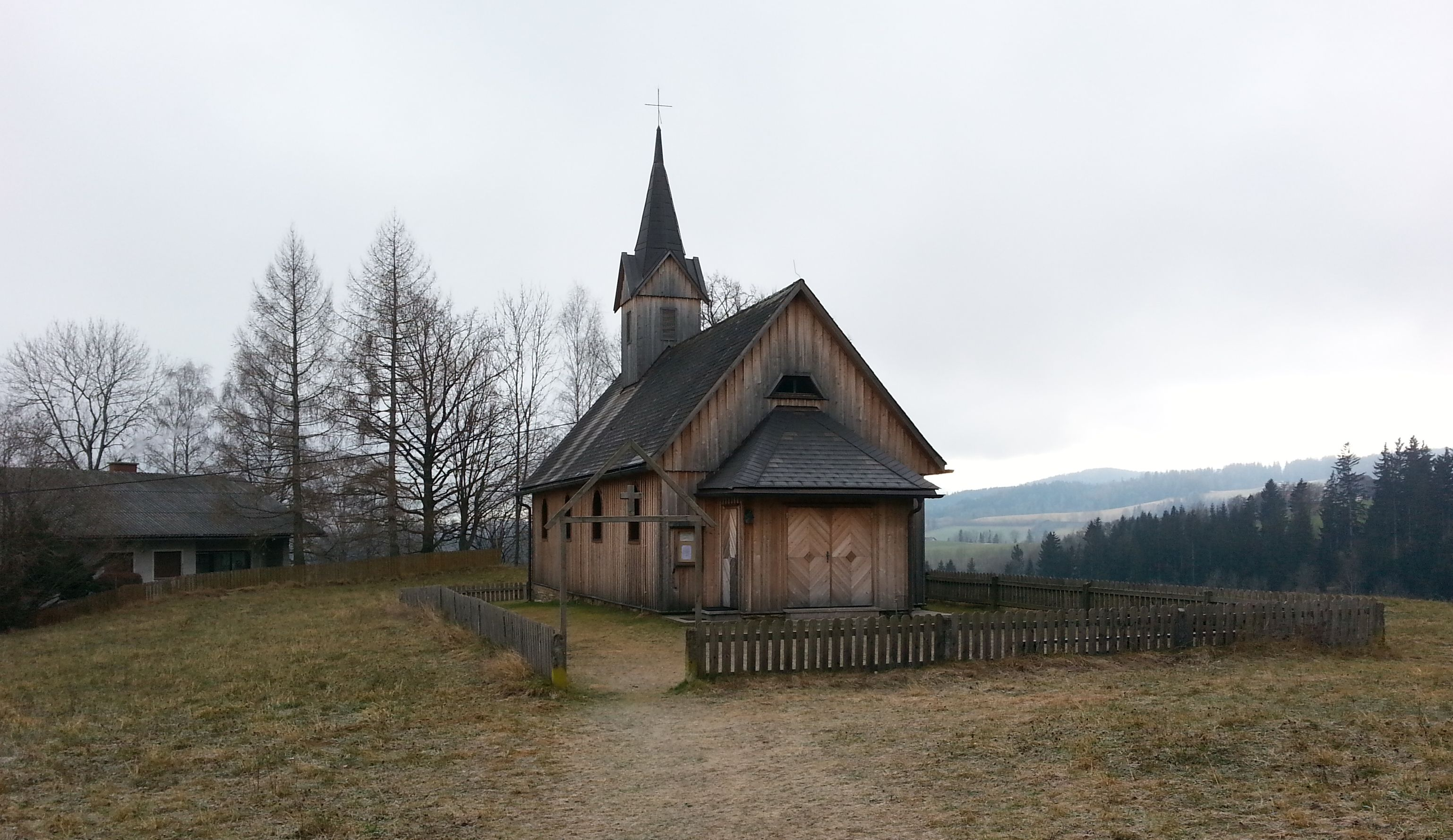 Kath. Filialkirche